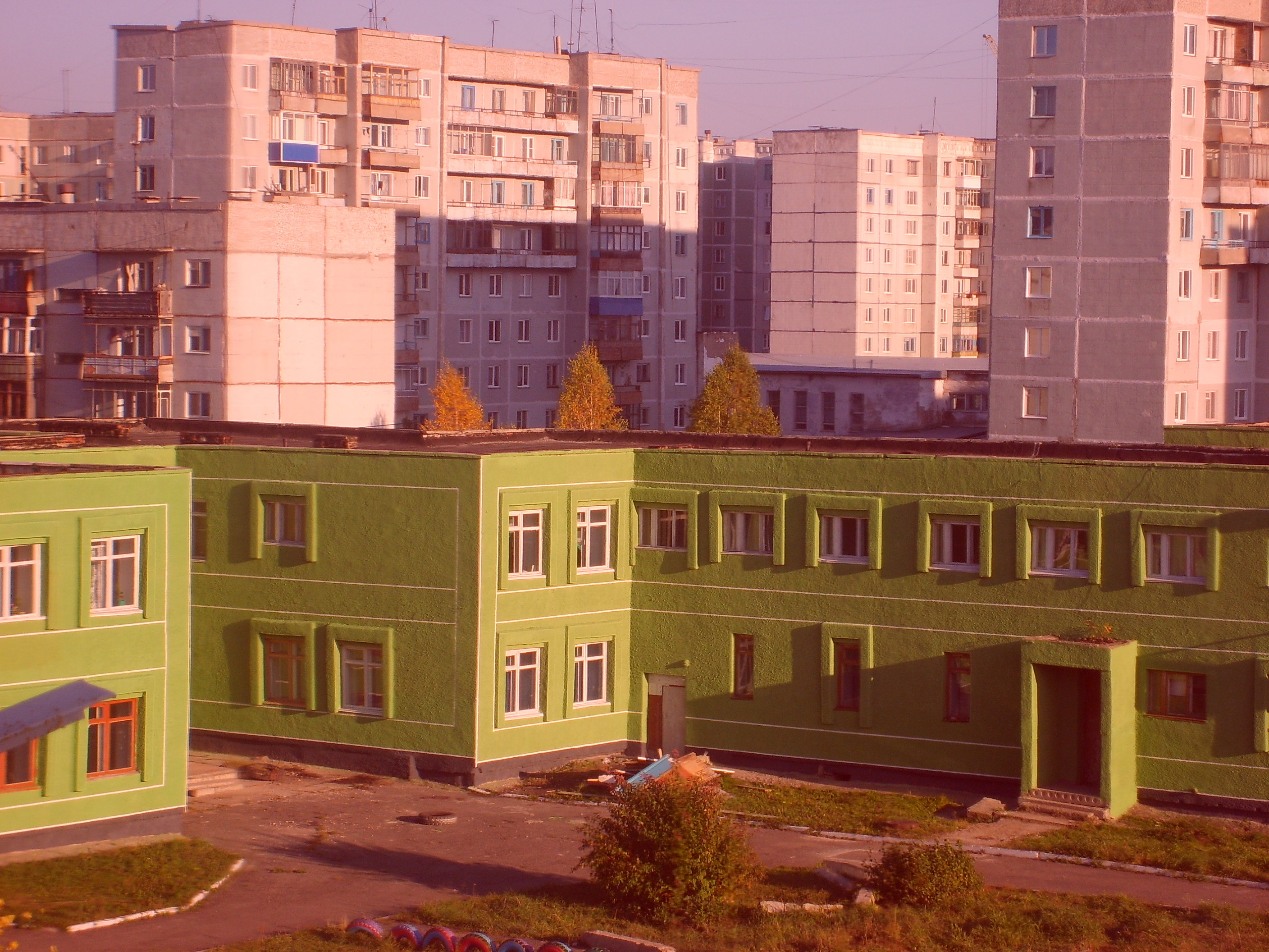 Красный Камень. Киселевск. Жилой массив.